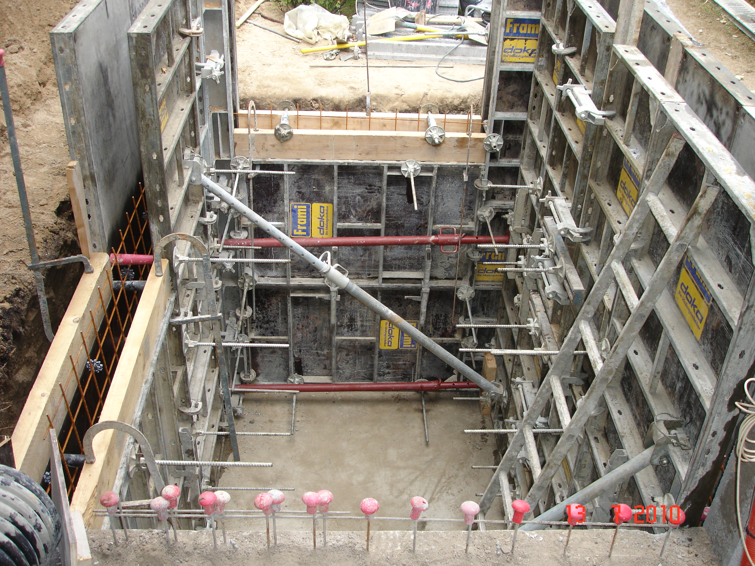 Les banches, abouts et étais sont posés